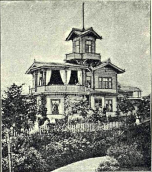 арх. Канстанцін Іванавіч Ціхаміраў саўмесна з братам Сяргеем Іванавічам Ціхаміравым. Дача для іх агульнага брата, лейб-медыка Найвысокага двара, Мікалая Іванавіча Ціхамірава